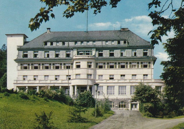 Kurhaus Stromberg 1979